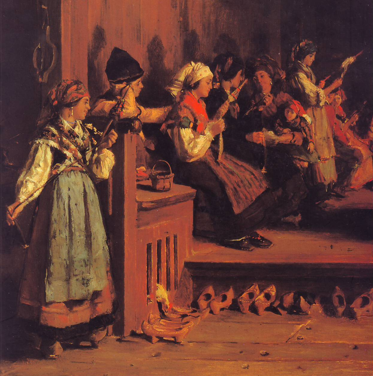 detail